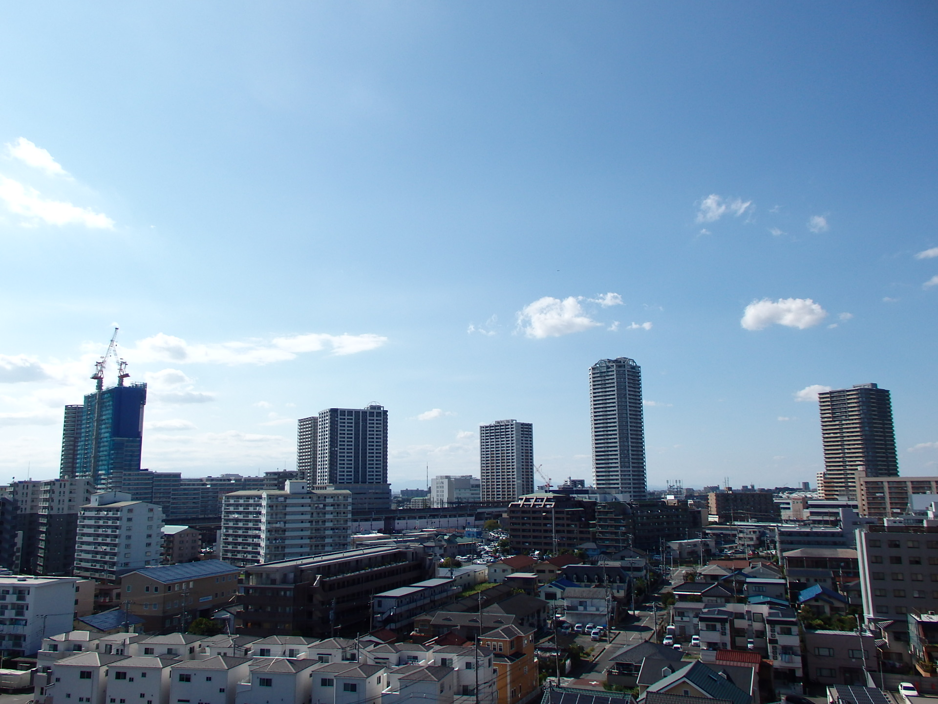 武蔵浦和周辺タワー群（2015年）